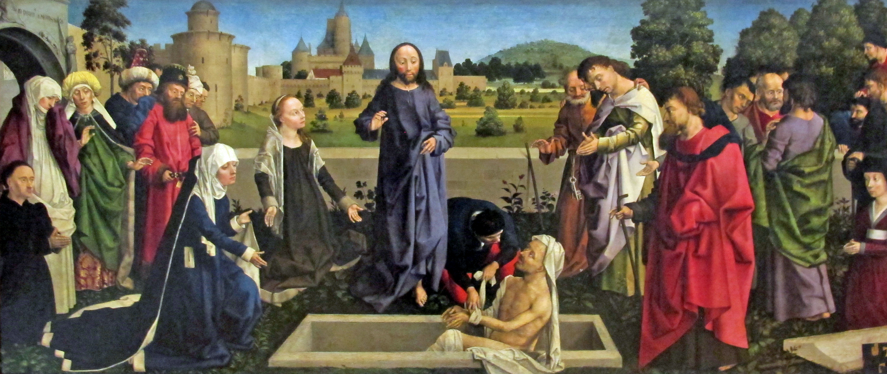 Dipinti francesi nel Louvre, Parigi, secc. XIV-XV